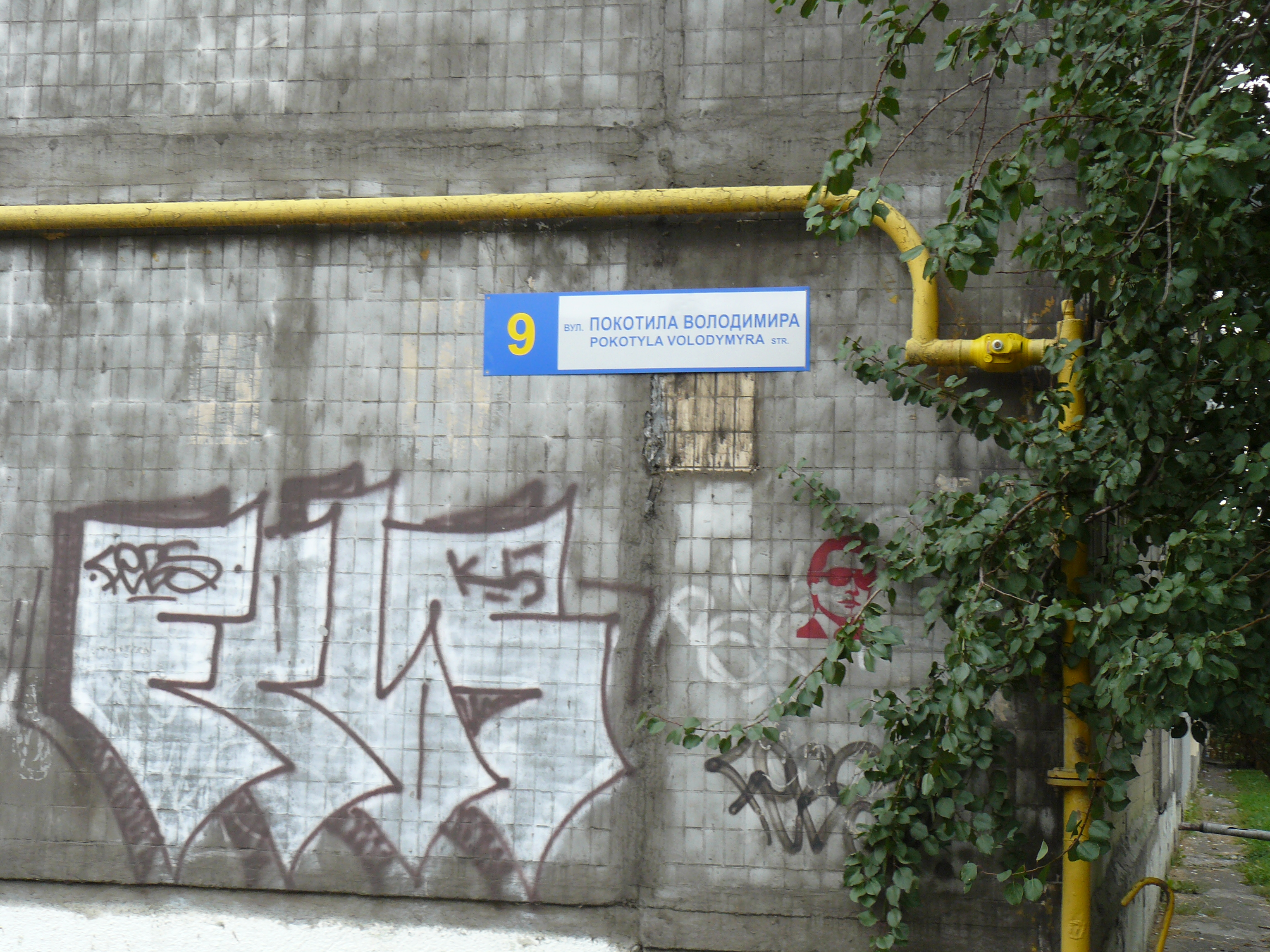 Вулиця Володимира Покотила в Києві